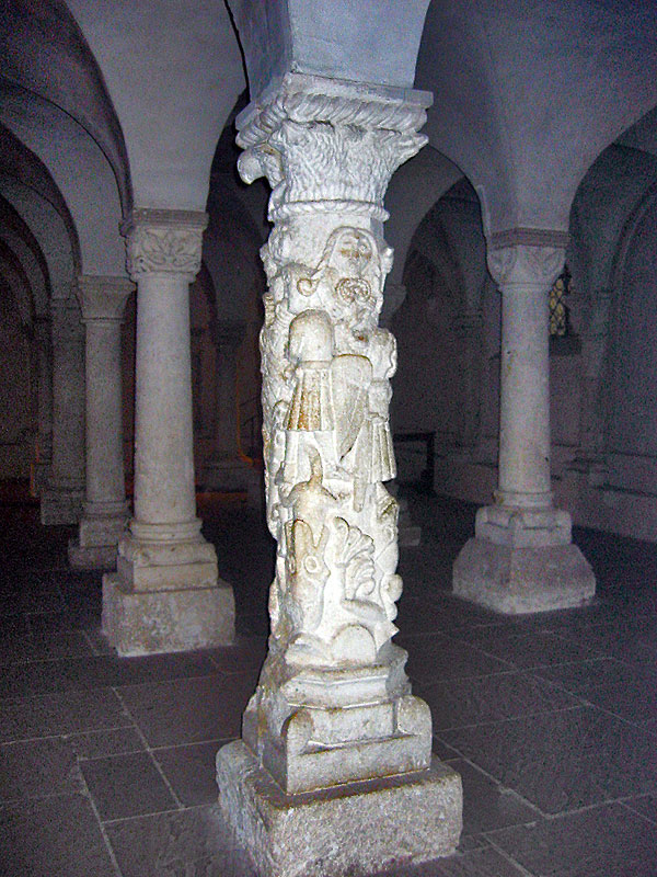 Bestiensäule in der Krypta, Dom zu Freising (12. Jahrhundert)